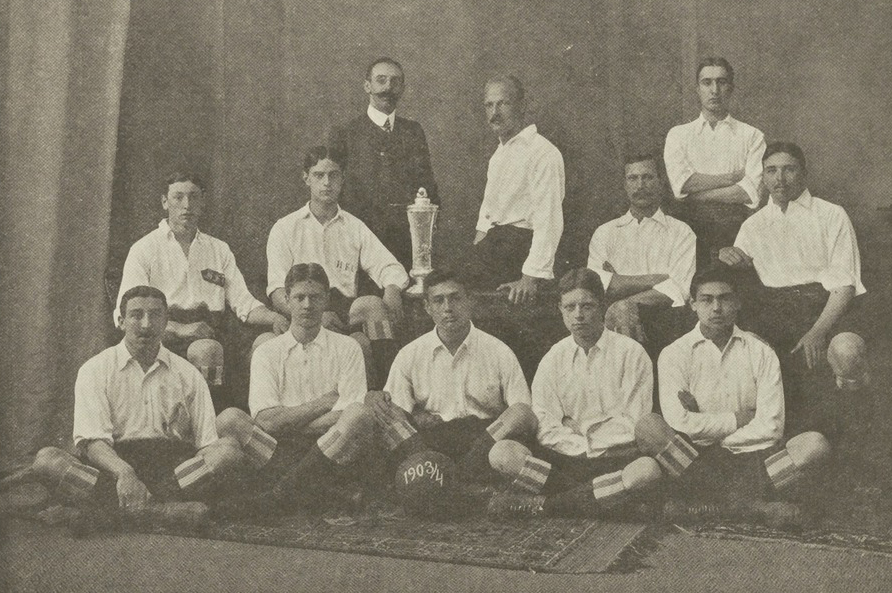 Historisch teamfoto van de Haarlemsche Football Club in het seizoen 1903/04, dat datzelfde seizoen beslag legde op de Holdertbeker.